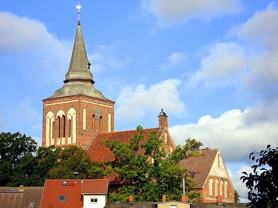 Die Backsteinkirche St. Johannis in Lassan